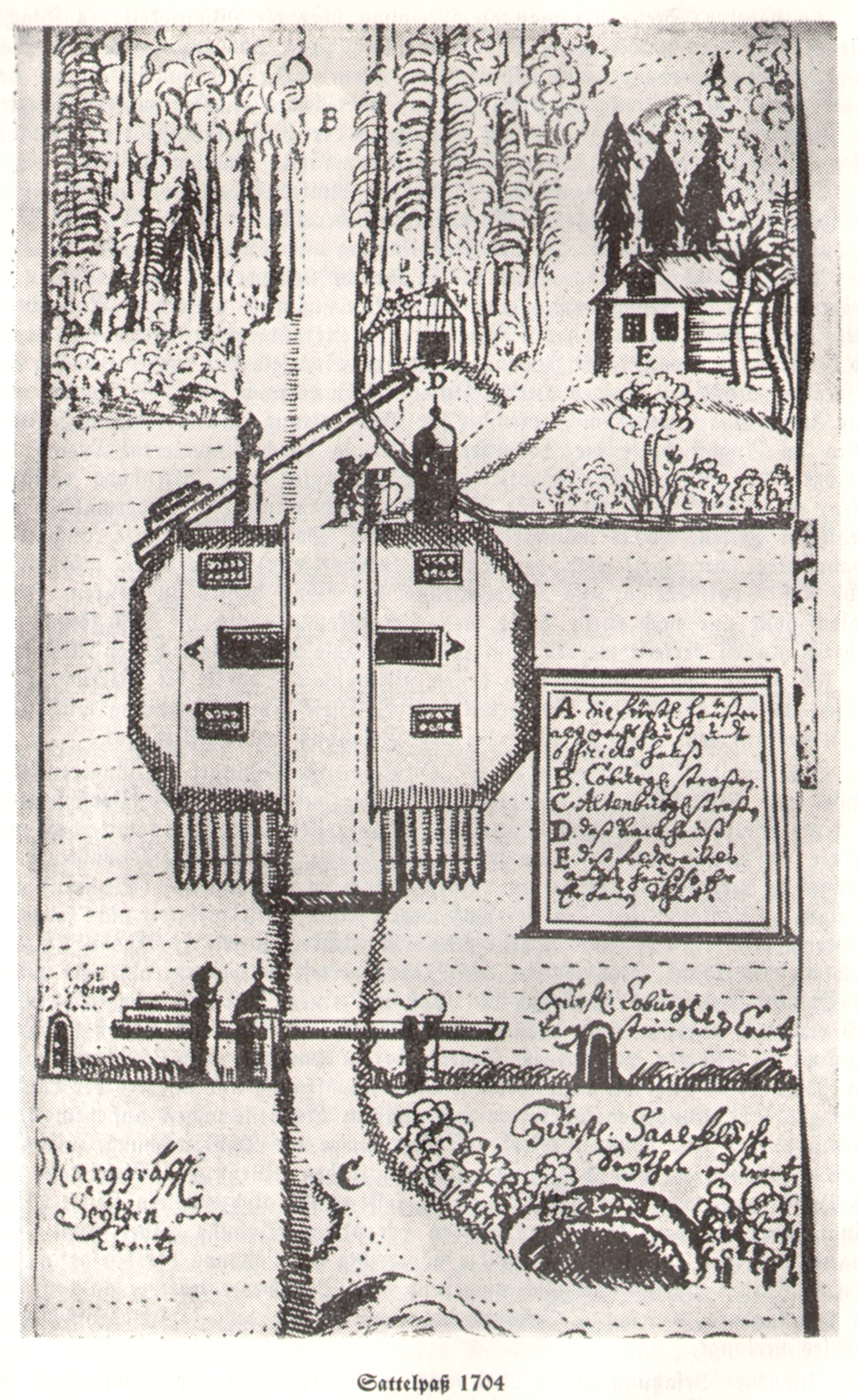 Darstellung des Grenzverlaufes am Sattelpaß mit skizzenhafter Ansicht und schriftlichen Notizen auf dem Blatt. Kopie eines Aktenblattes von 1704. Das mit dargestellte sogenannte Wachthaus brannte 1927 nieder.